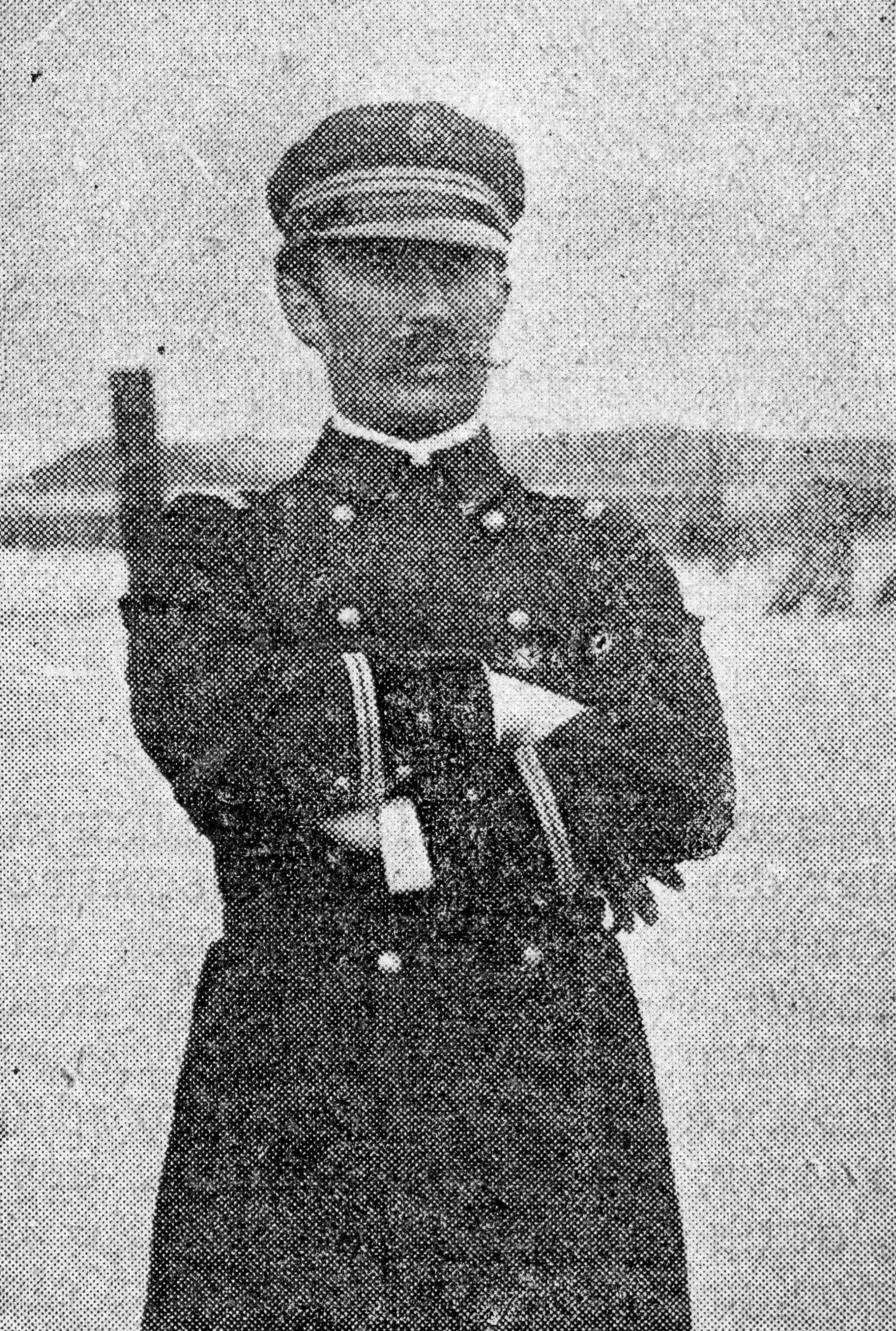 Touche à tout 1910 2ème semestre p 37Le Dr. Savidan par Branger